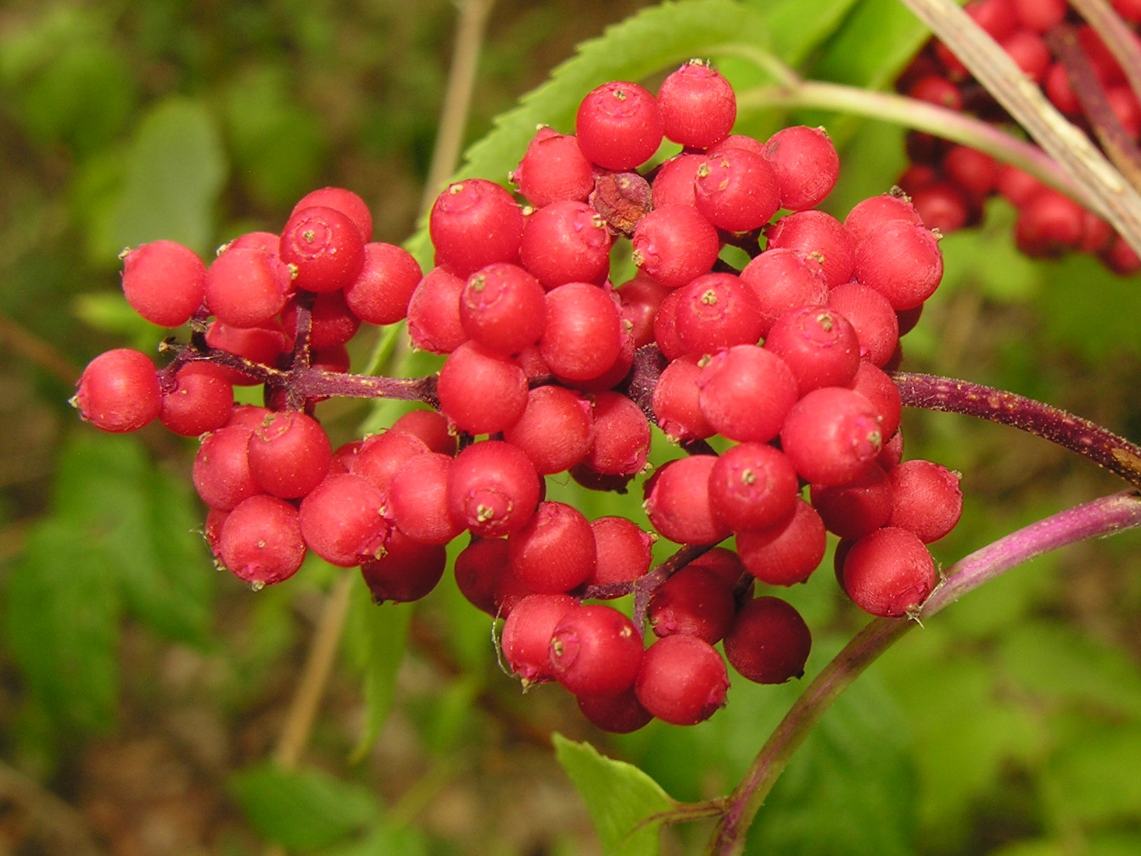 Raudonuogis šeivamedis (Sambucus racemosa) Šeima. Ūksmininiai Foto: Algirdas, 2006 m. liepos 18 d., Lietuva